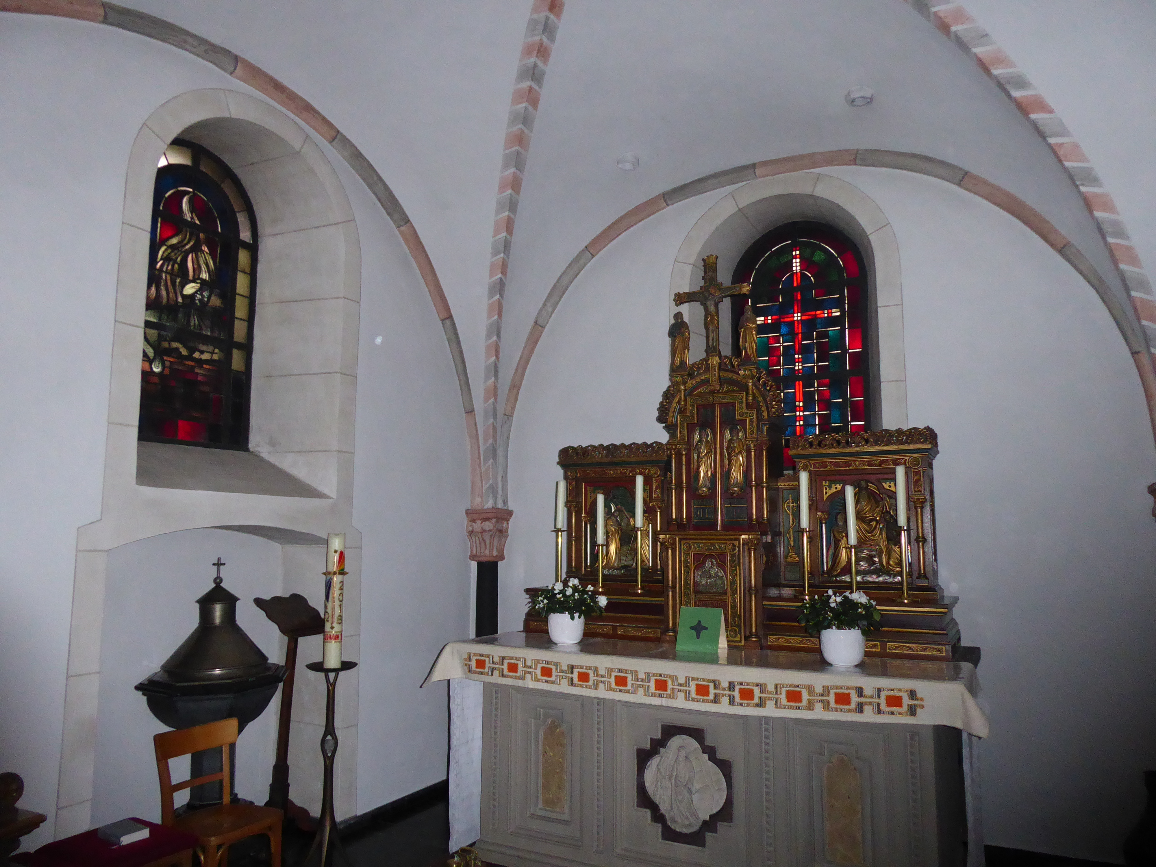 St. Johann Baptist (Niedermerz)